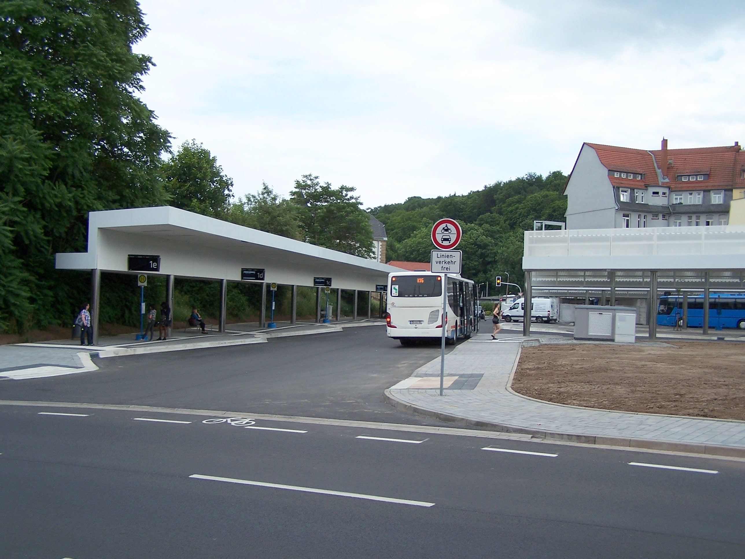 Ansichten des Ende Juni 2017 fertig gestellten Zentralen Omnibusbahnhofs in Eisenach.